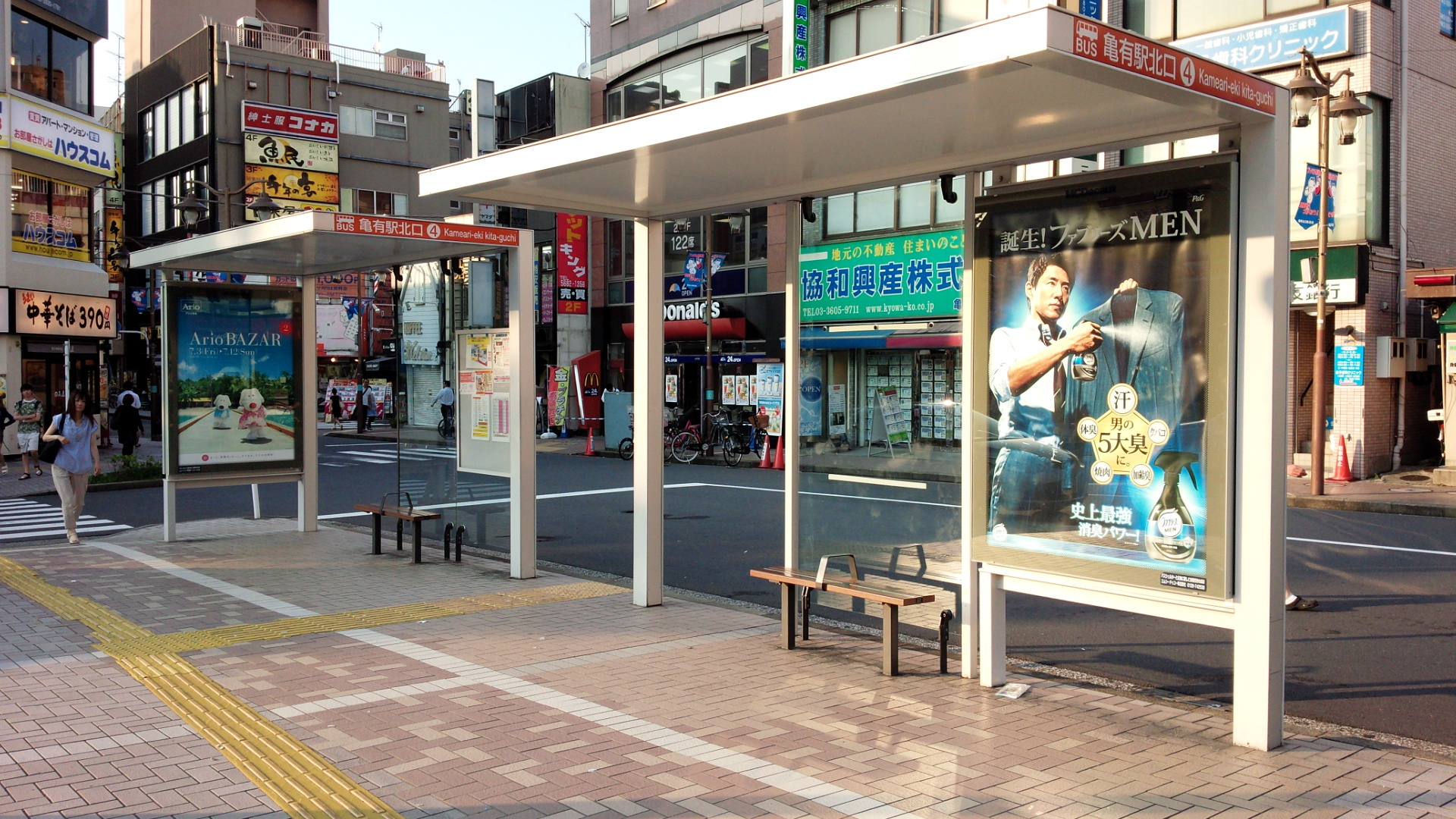 2015年7月11日 亀有駅にてjiyayo撮影。